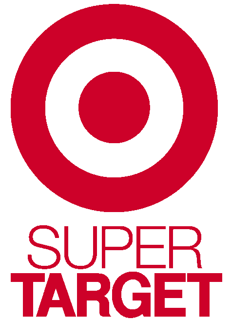 SuperTarget logo, 2006–present.